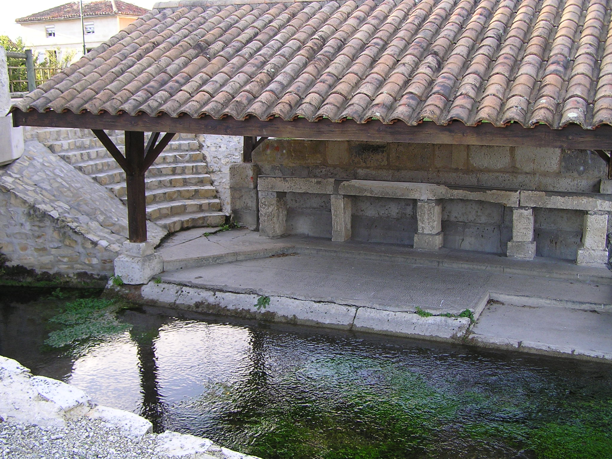 lavoir sur la Charraud à Voeuil-et-Giget